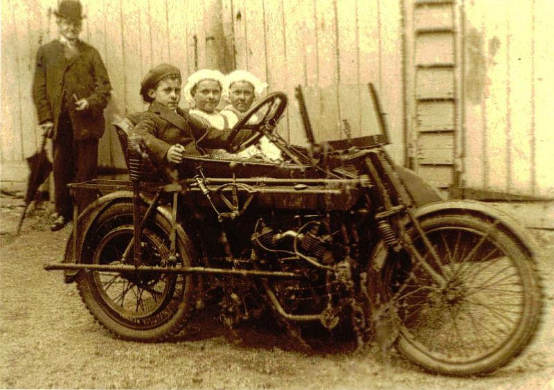 Foto beschikbaar gesteld door Bill Peacock aan uploader. Familiefoto ouder dan 70 jaar, geplaatst met toestemming van Stephen Peacock, Kent, England en zijn vader Bill Peacock, Croydon, Surrey, England.